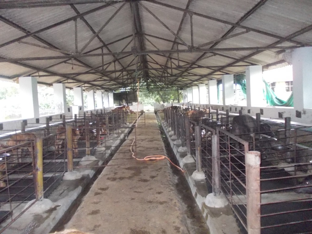 കന്നുകാലി ഫാം